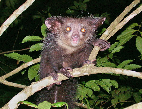 Aye-aye (Daubentonia madagascariensis)